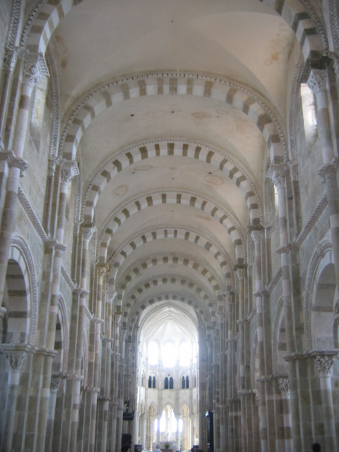 Abbatiale de Vézelay, Bourgogne, France : nef